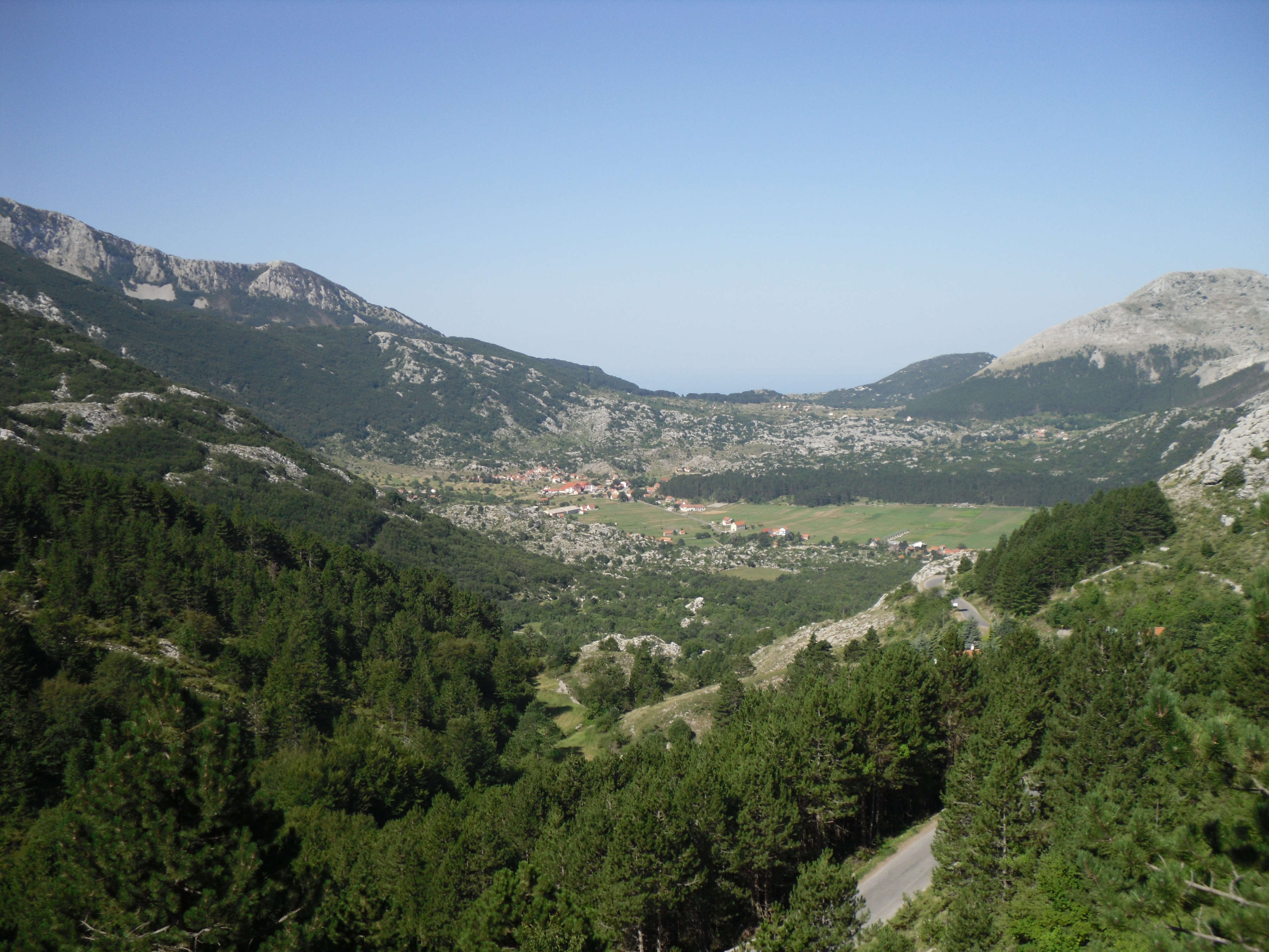 Njegusi